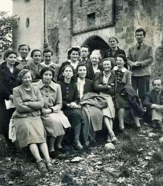 Zusammenkunft der Mitarbeiter der Kinderhilfe auf dem Schloss La Hille, Montégut-Plantaurel bei Toulouse, Frankreich, 1941